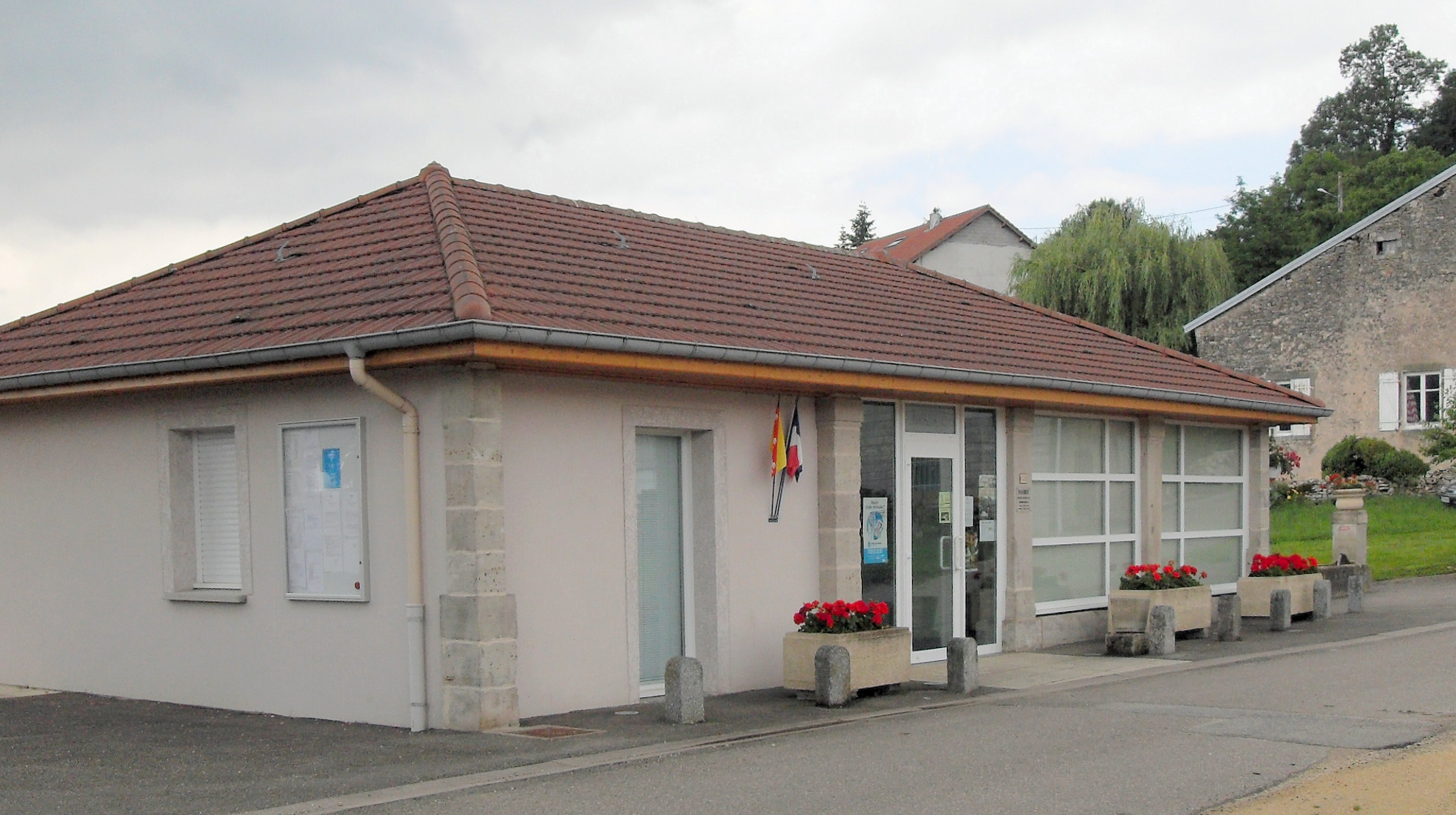 La mairie de Bocquegney